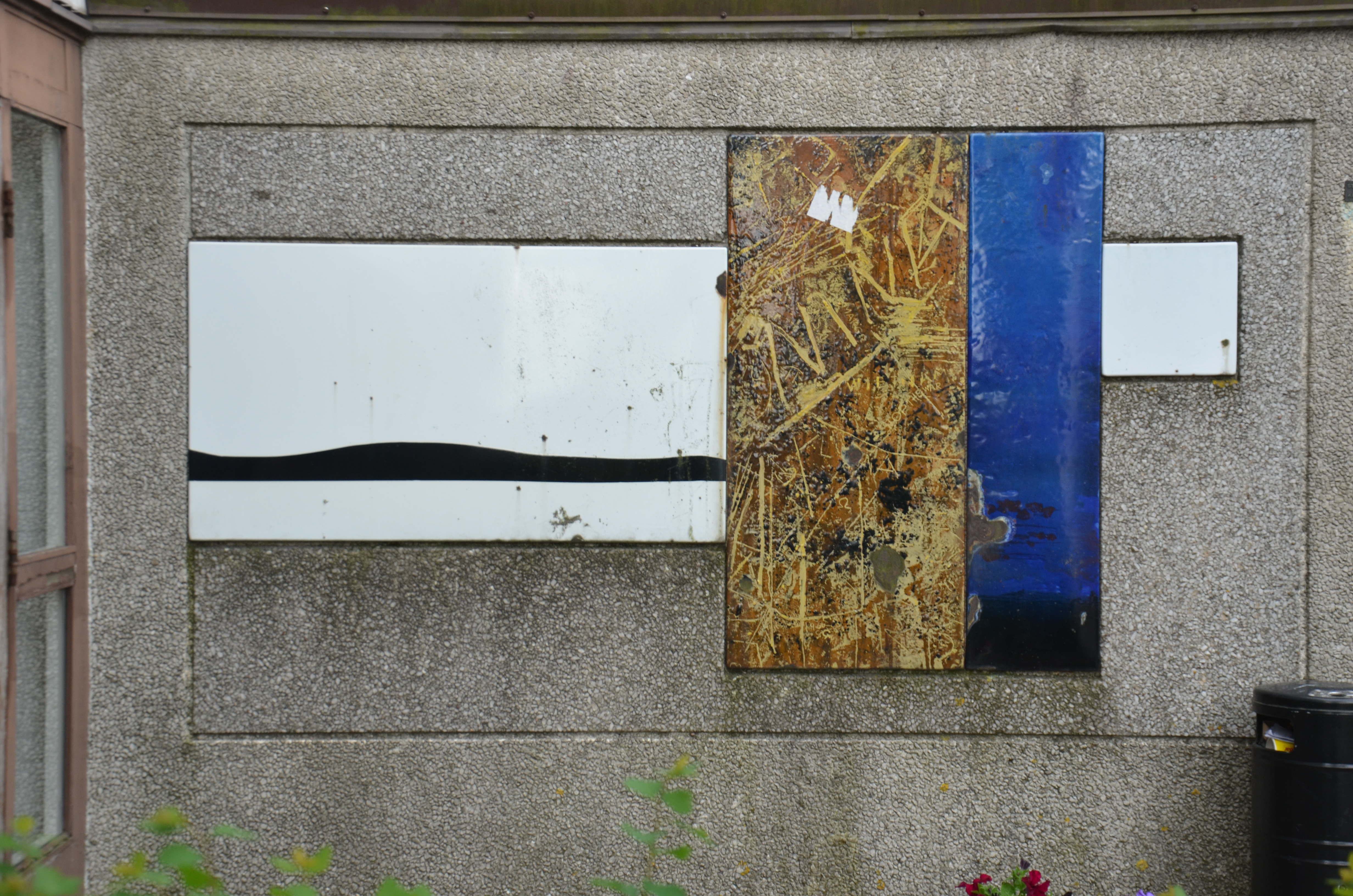 Klotter på Förlandagränd 84 i Östberga i Stockholm av Stig Ghylfe